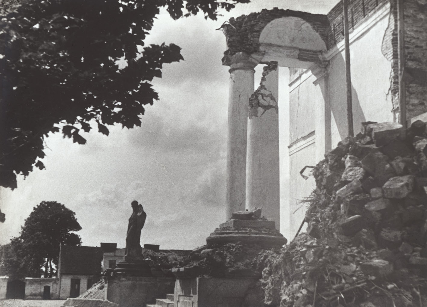 pl, Suwałki, konkatedra św. Aleksandra